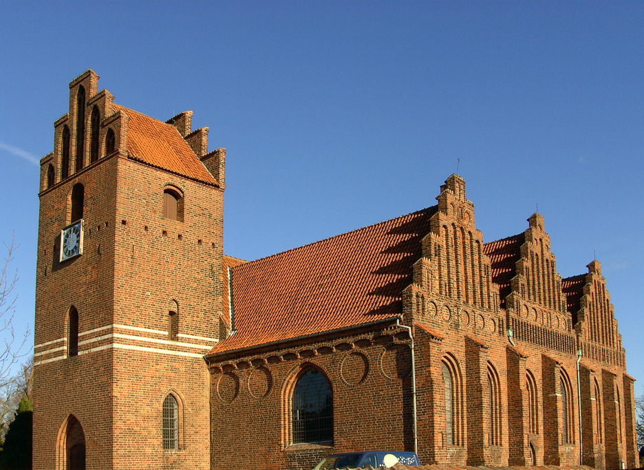 fra sydvest